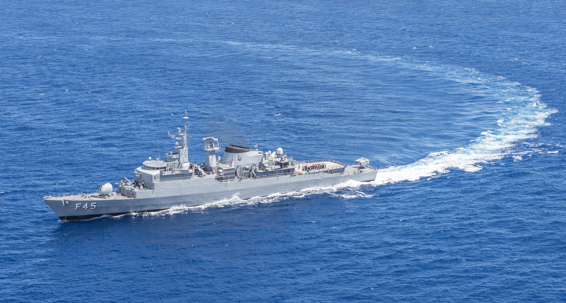 Arquivo liberado pela Marinha do Brasil através de projeto GLAM com Wiki Educação Brasil